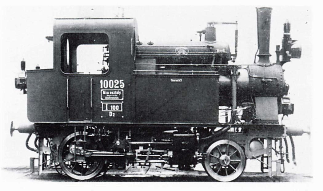 A MÁV 10025 (később 175.005) pályaszámú "motorpótló" gőzmozdonya.